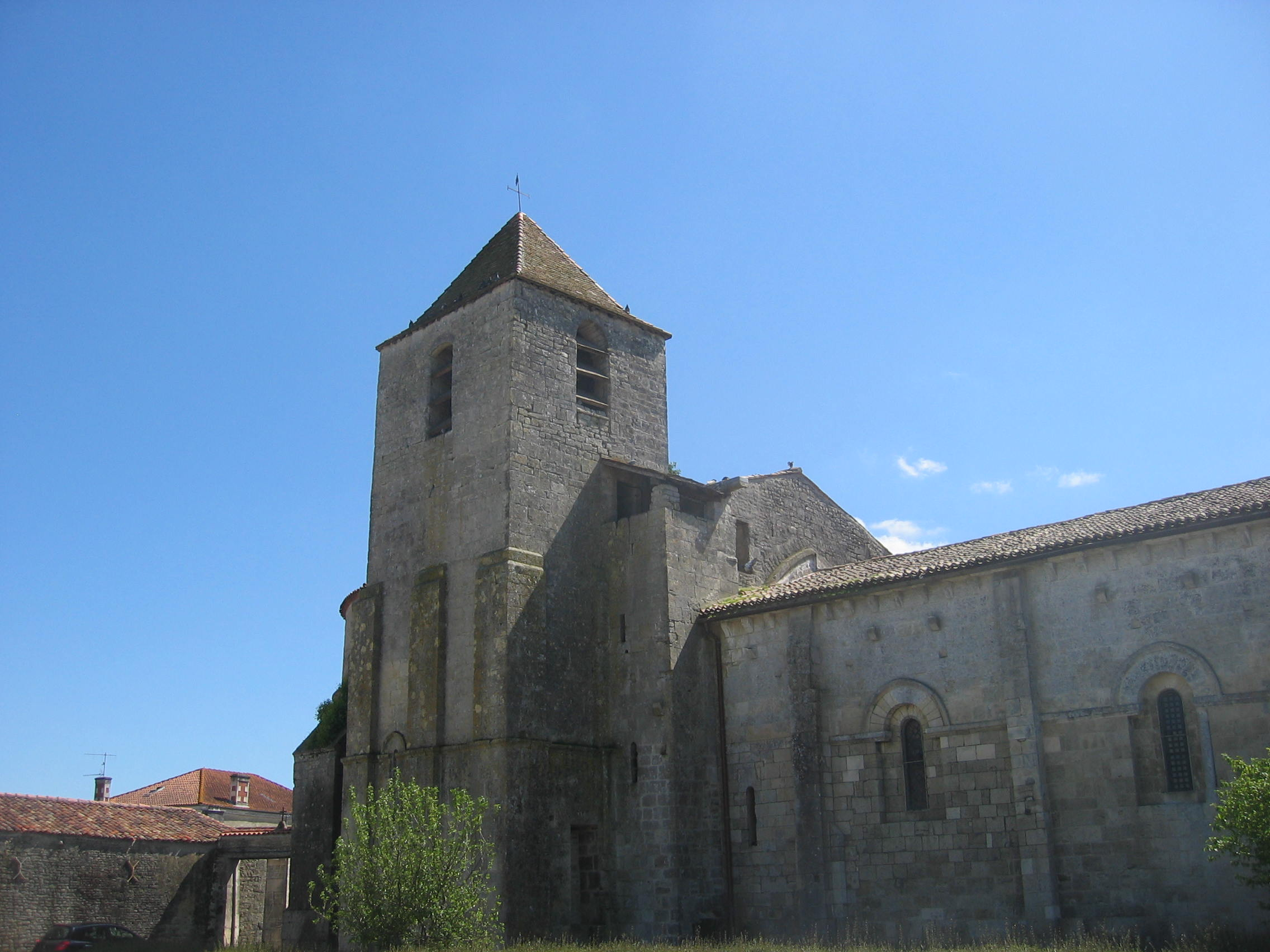 Eglise "St Nazaire" de Migron